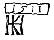 Painter Hans von Kulmbach 1511 signature